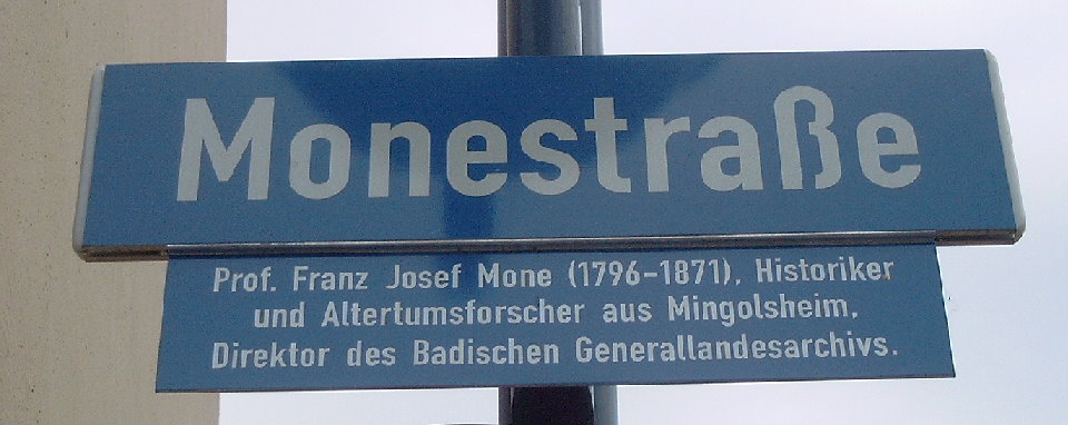 Mone Straße-Namens-Schild